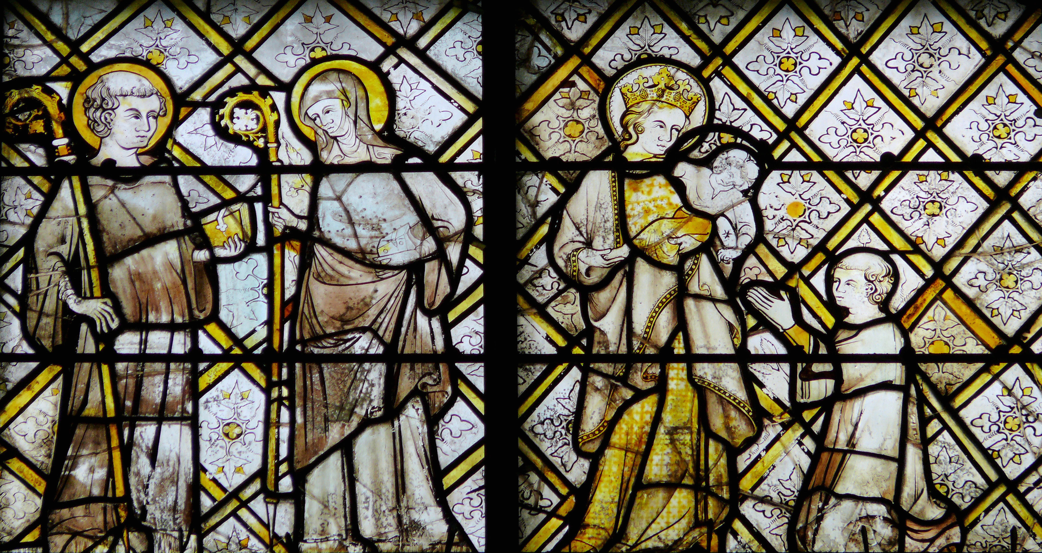 Cathédrale de Chartres - Transept - Vitrail de la Vie de saint Appolinaire - Partie en grisaille de la partie inférieure : le chanoine Thierry agenouillé devant la Vierge à l'Enfant